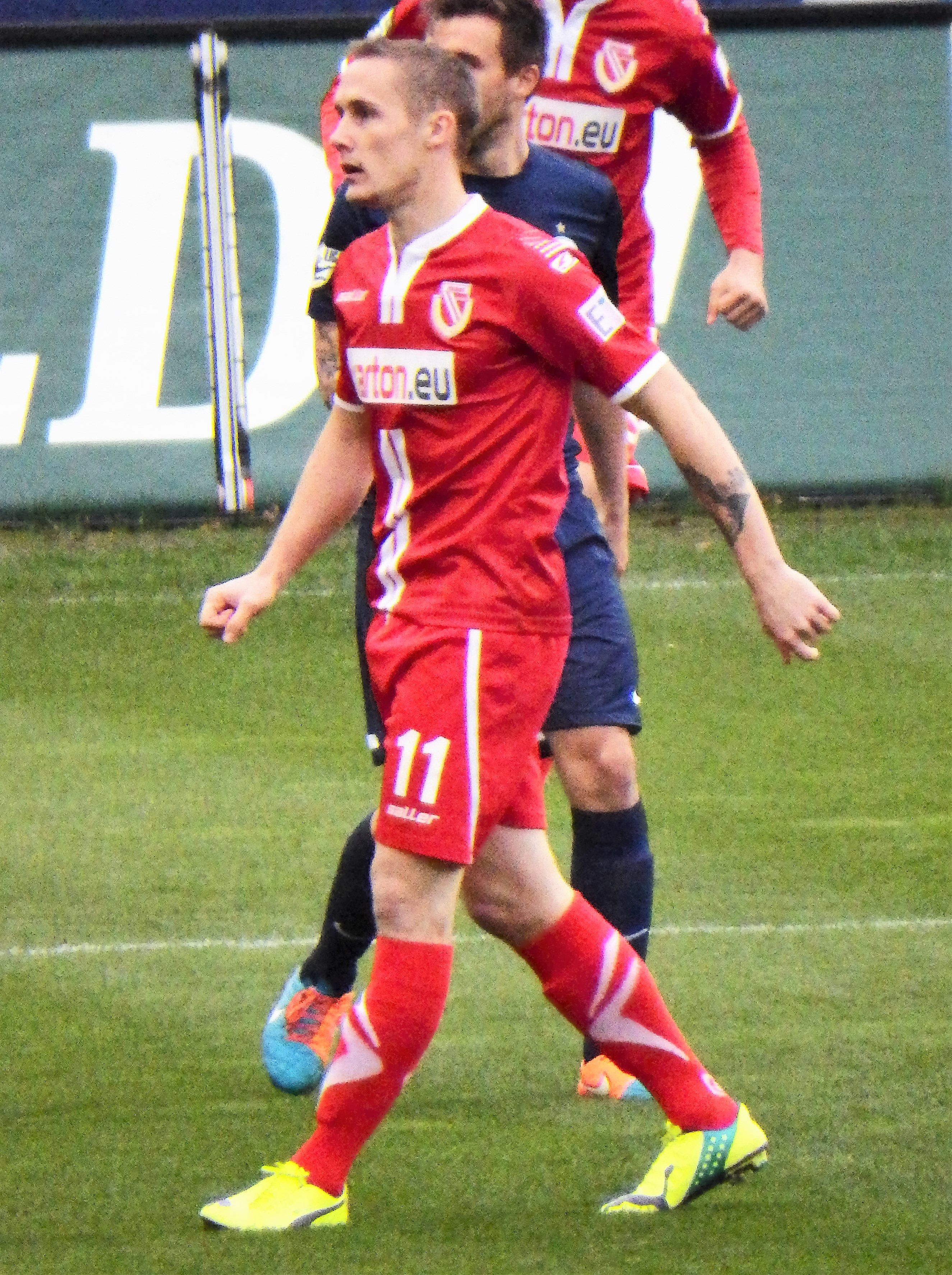 Michel, Sven Cottbus 14-15